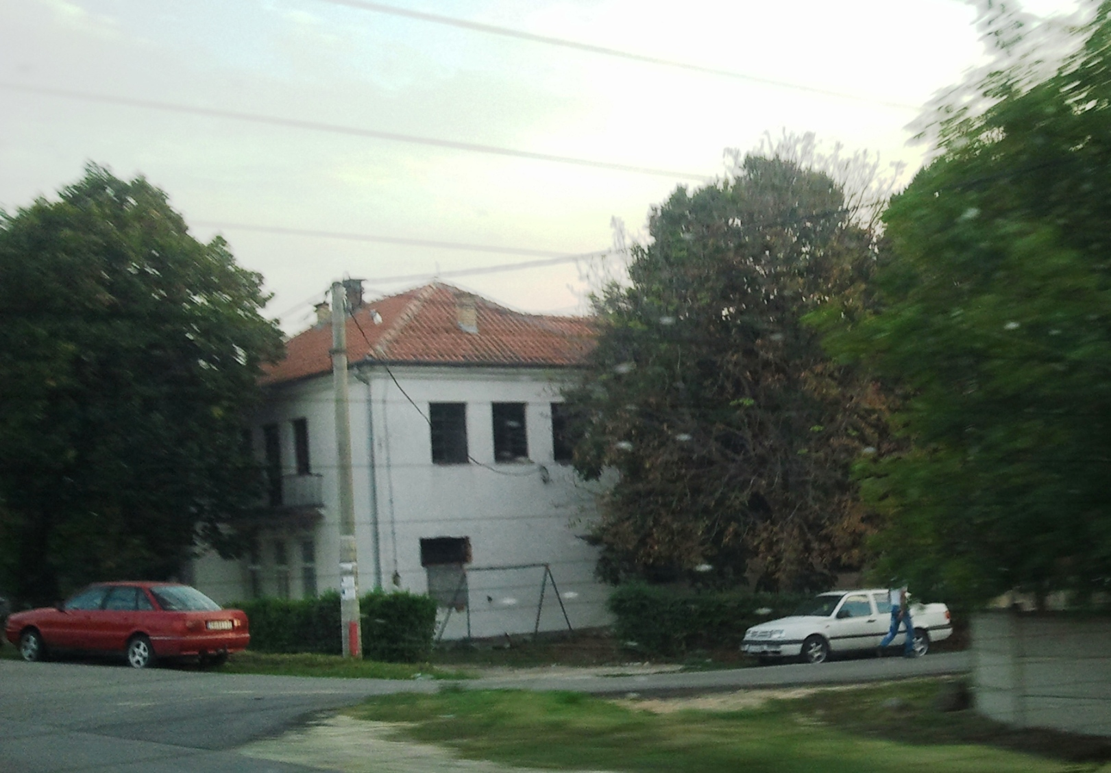 Дом културе у Батуши - Culture House in Batuša.jpg